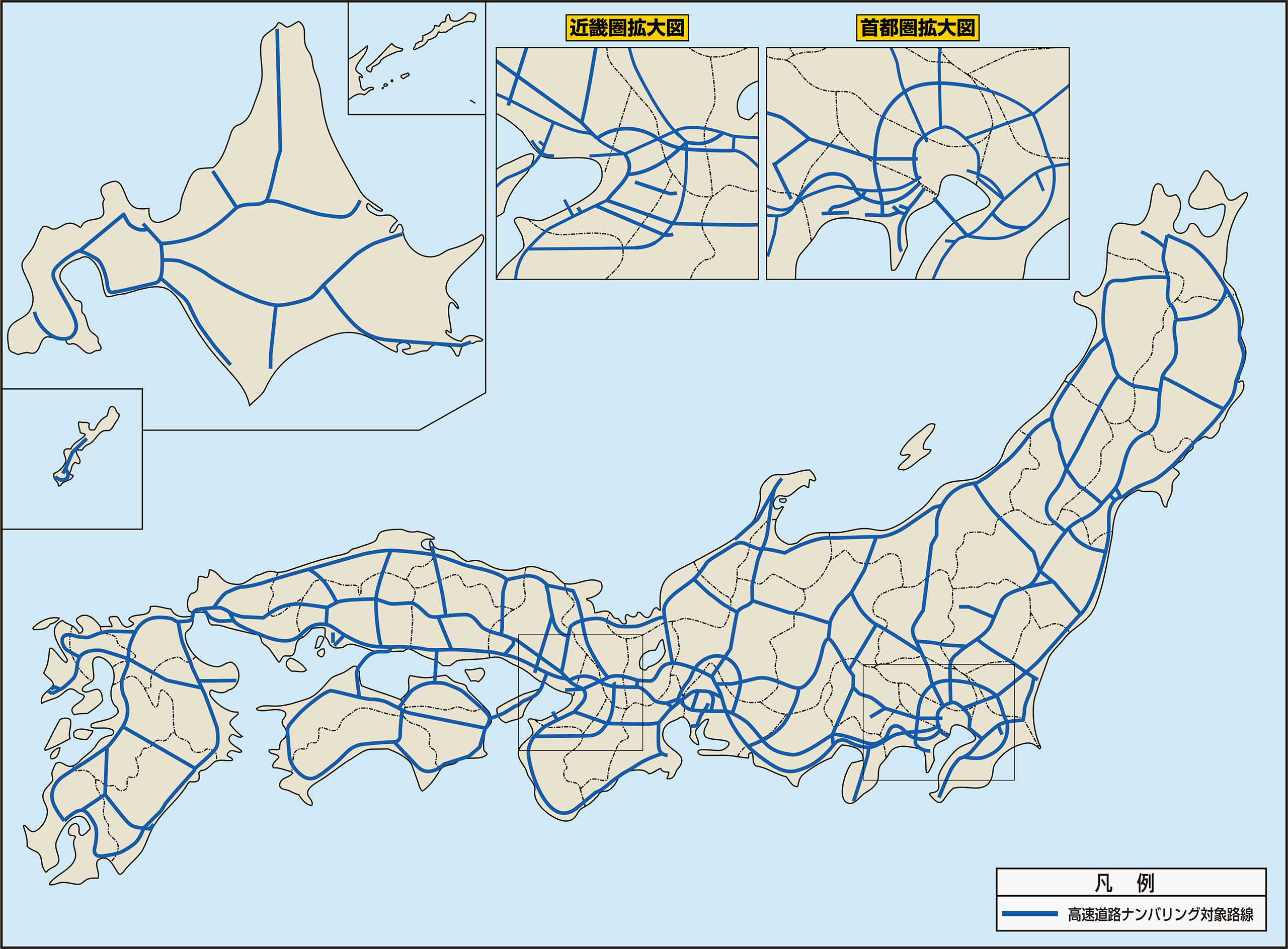 高速道路ナンバリングの対象路線図。